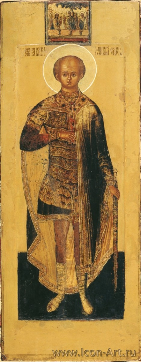 Мерная икона. Икона в окладе. Москва, мастерские Кремля, 1648 г.. Происходит из Архангельского собора Московского Кремля. Инв. № Ж-552/1-2.(46X17 дерево, левкас, паволока, серебро; темпера.)